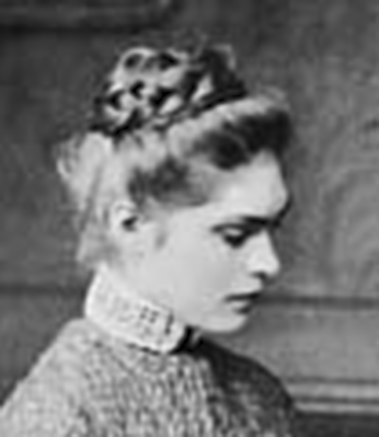 Sibylle von Olfers (1881,-1916), Nonne, Erzieherin, Kinderbuchillustratorin und -autorin